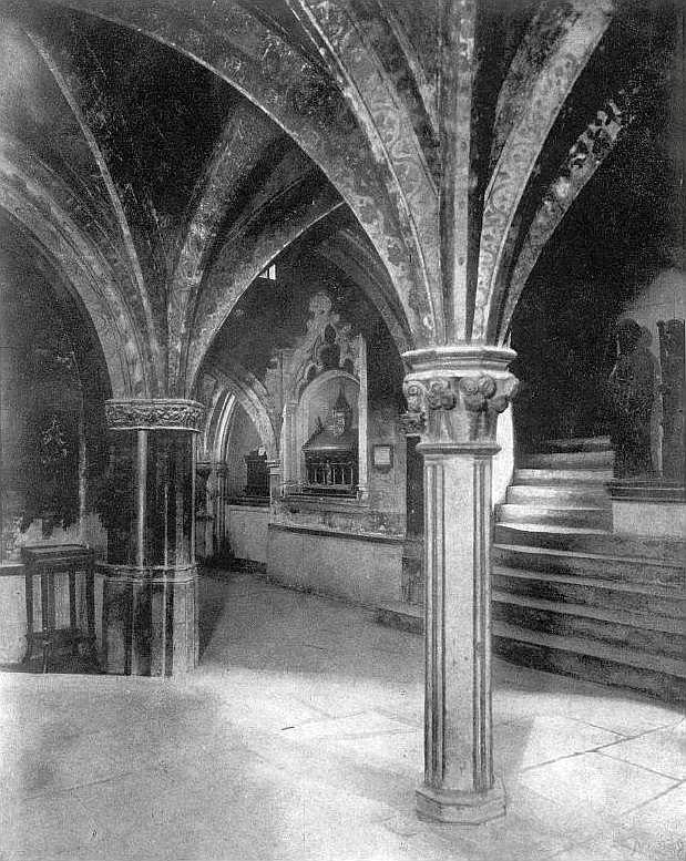 La crypte de la basilique Saint-Sernin, en 1937.